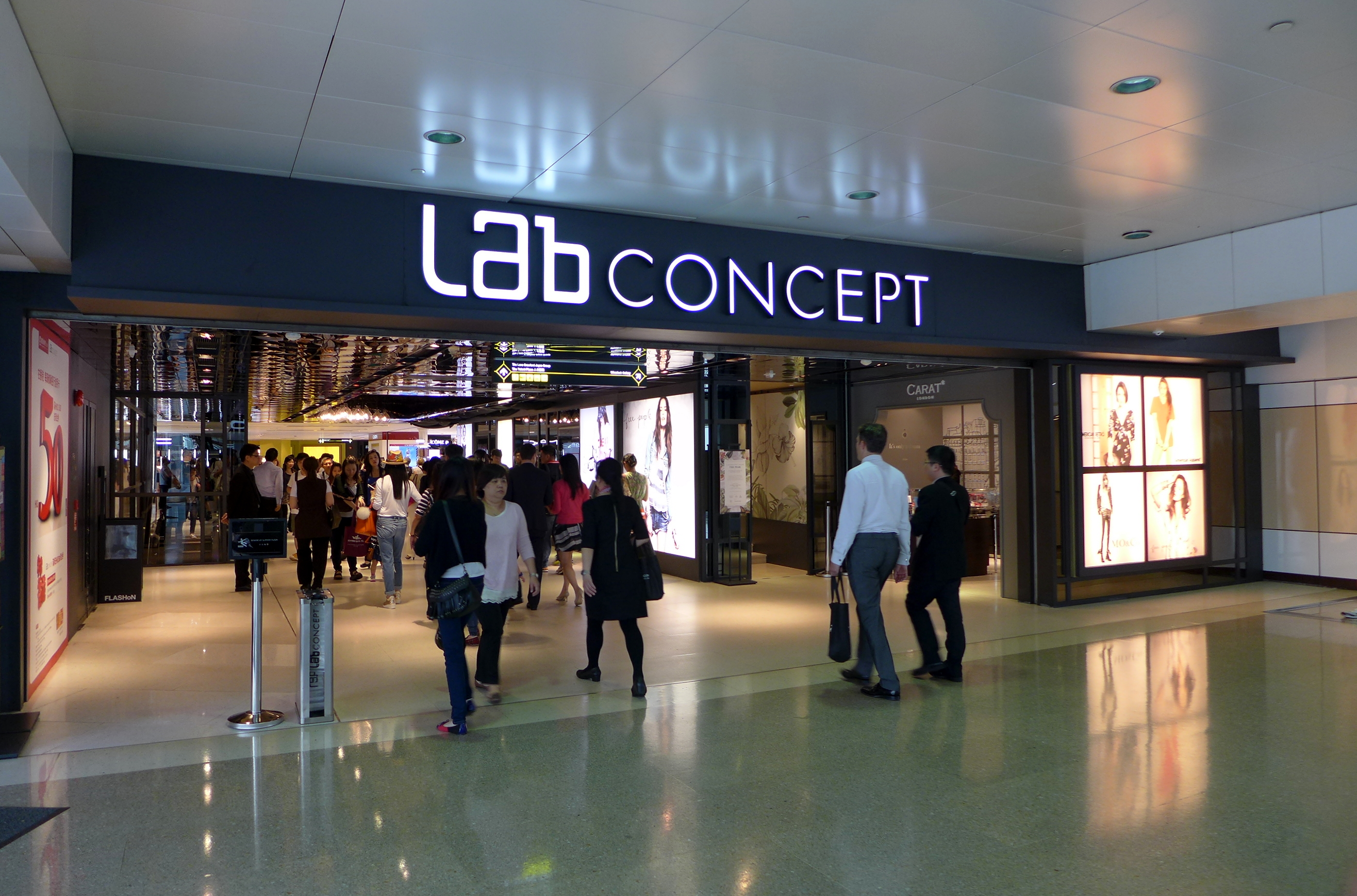 Queensway Plaza Enterance